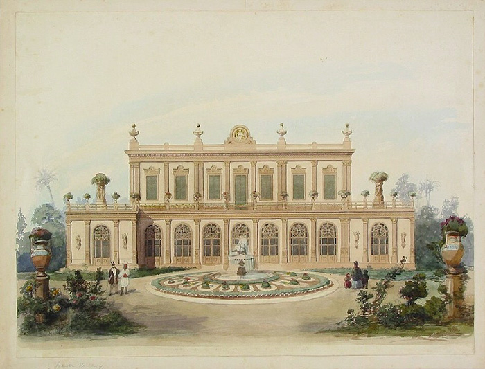 Aufriss einer Villa in Schubra (Kairo), möglicherweise Villa Oppenheim